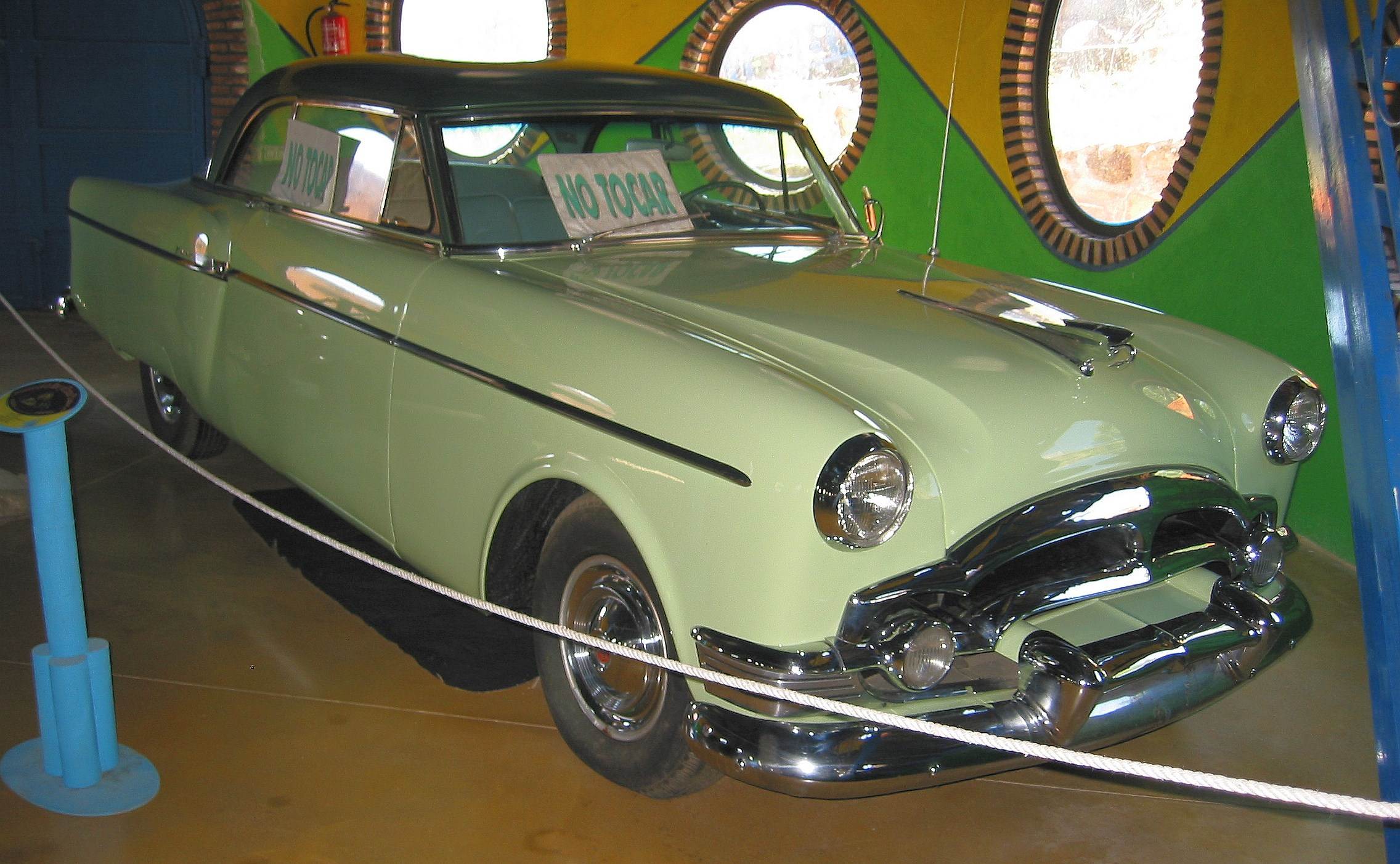 Packard Clipper Super Panama Model 5467 1954